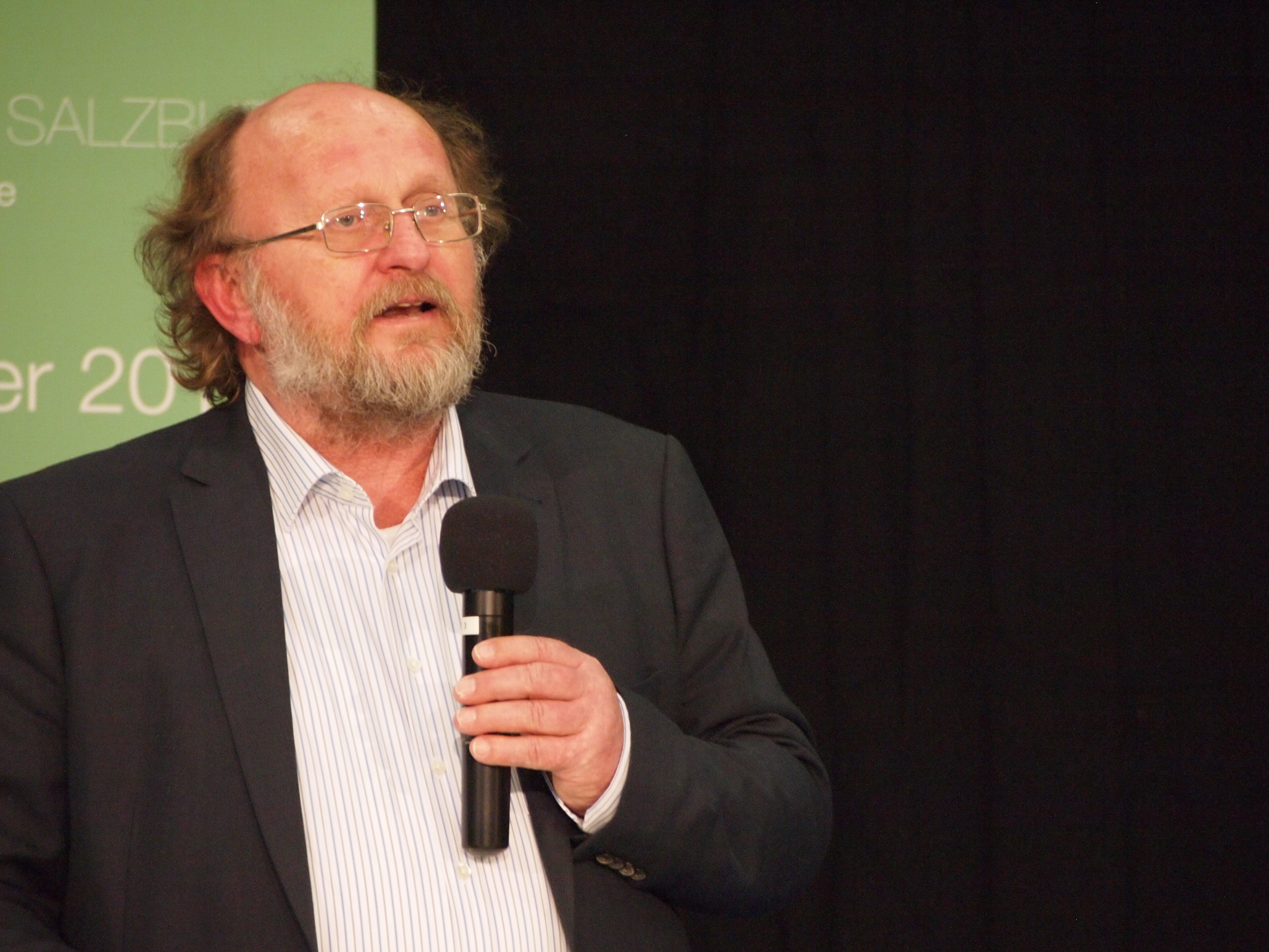 Dr. Klaus Schmidt (ARGE Archäologie) auf der Monumento 2014 Personality rights warningAlthough this work is freely licensed or in the public domain, the person(s) shown may have rights that legally restrict certain re-uses unless those depicted consent to such uses. In these cases, a model release or other evidence of consent could protect you from infringement claims.